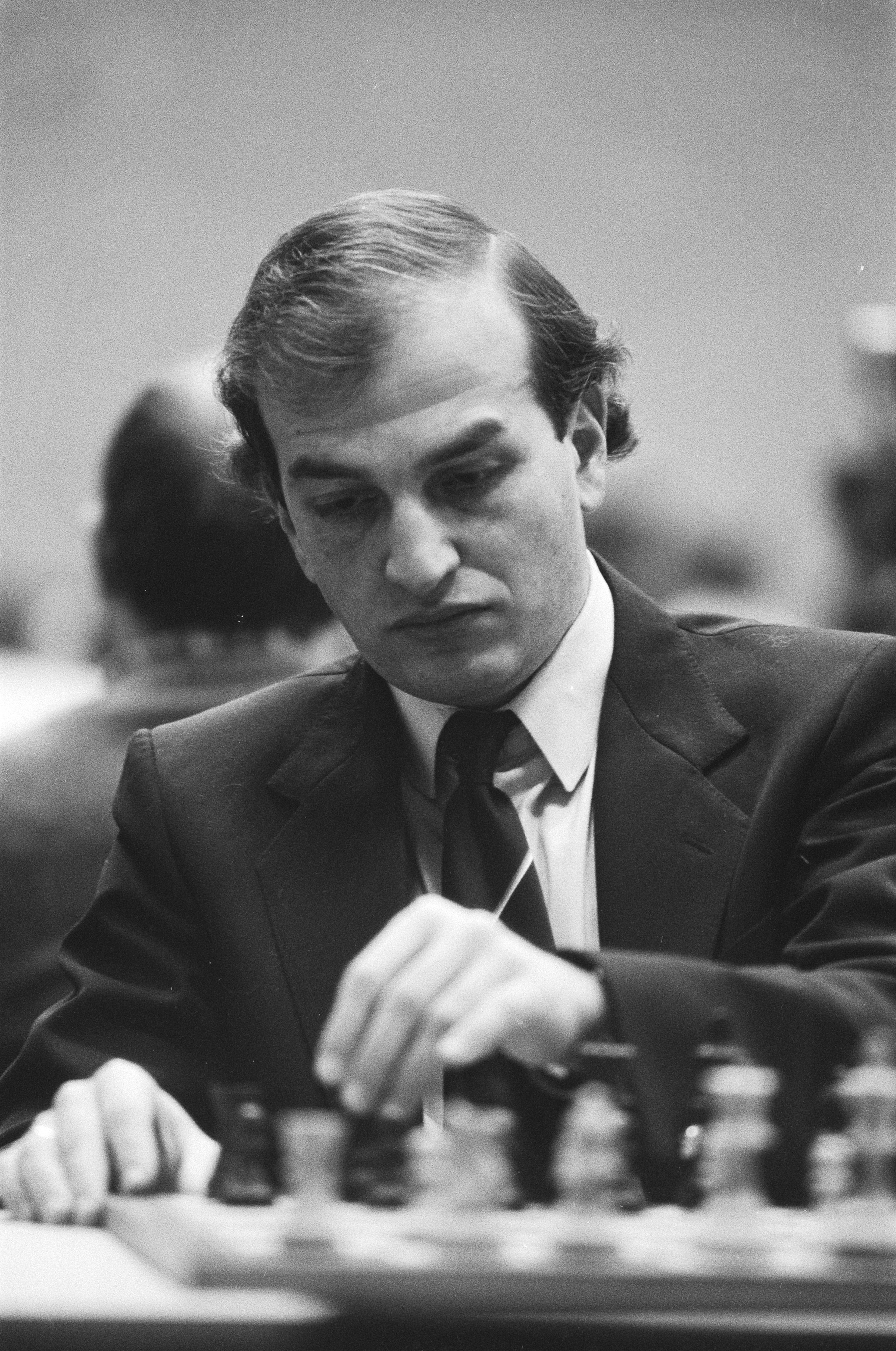 Collectie / Archief : Fotocollectie Anefo Reportage / Serie : [ onbekend ] Beschrijving : Hoogovenschaaktoernooi, 1e ronde; Alexander Beliavsky Datum : 13 januari 1984 Trefwoorden : schaken Persoonsnaam : Alexander Beliavsky Instellingsnaam : Hoogovenschaaktournooi Fotograaf : Bogaerts, Rob / Anefo Auteursrechthebbende : Nationaal Archief Materiaalsoort : Negatief (zwart/wit) Nummer archiefinventaris : bekijk toegang 2.24.01.05 Bestanddeelnummer : 932-8318